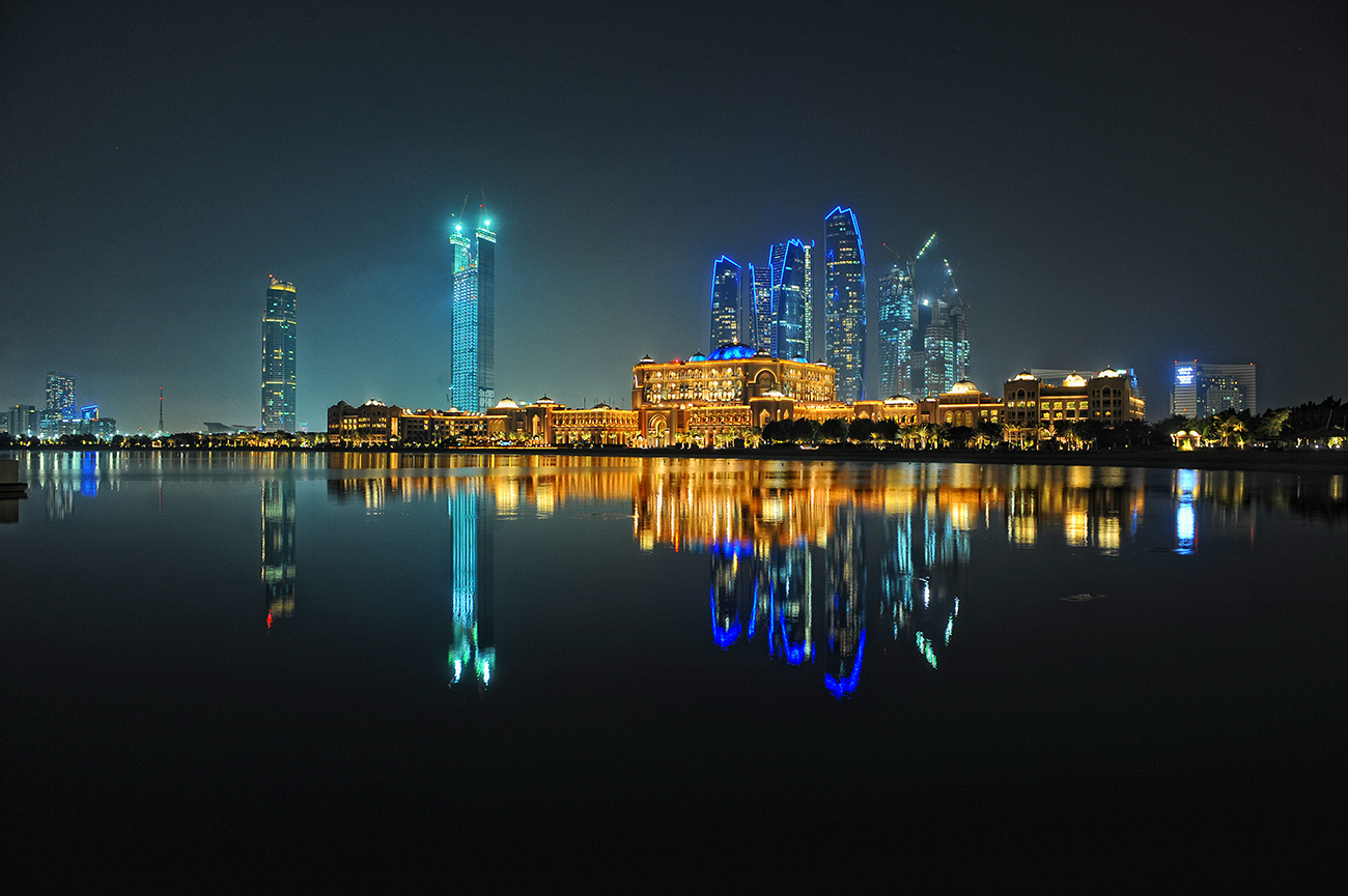 Abu Dhabi 2013